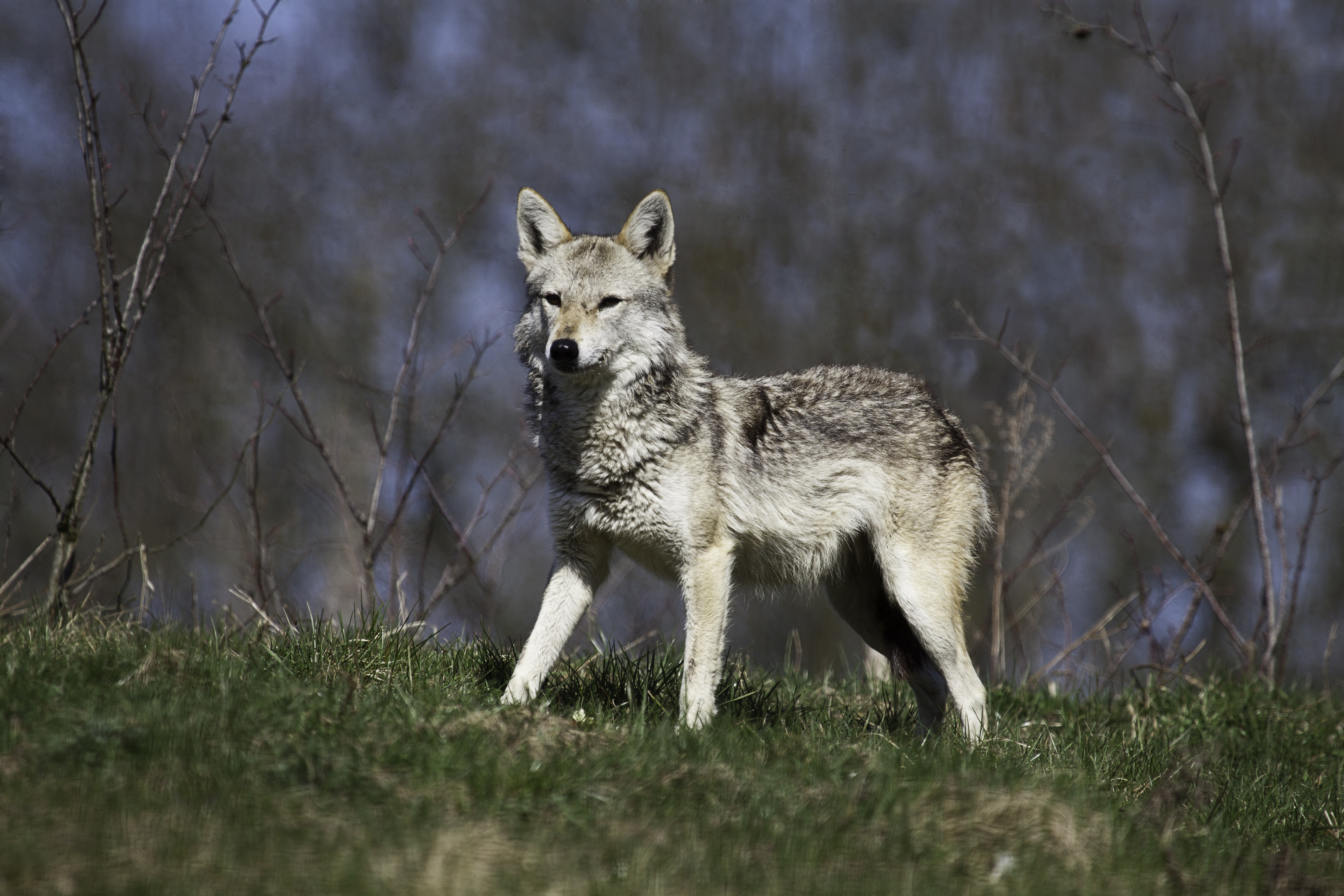 Female Egyptian wolf, Naturzoo, Rheine